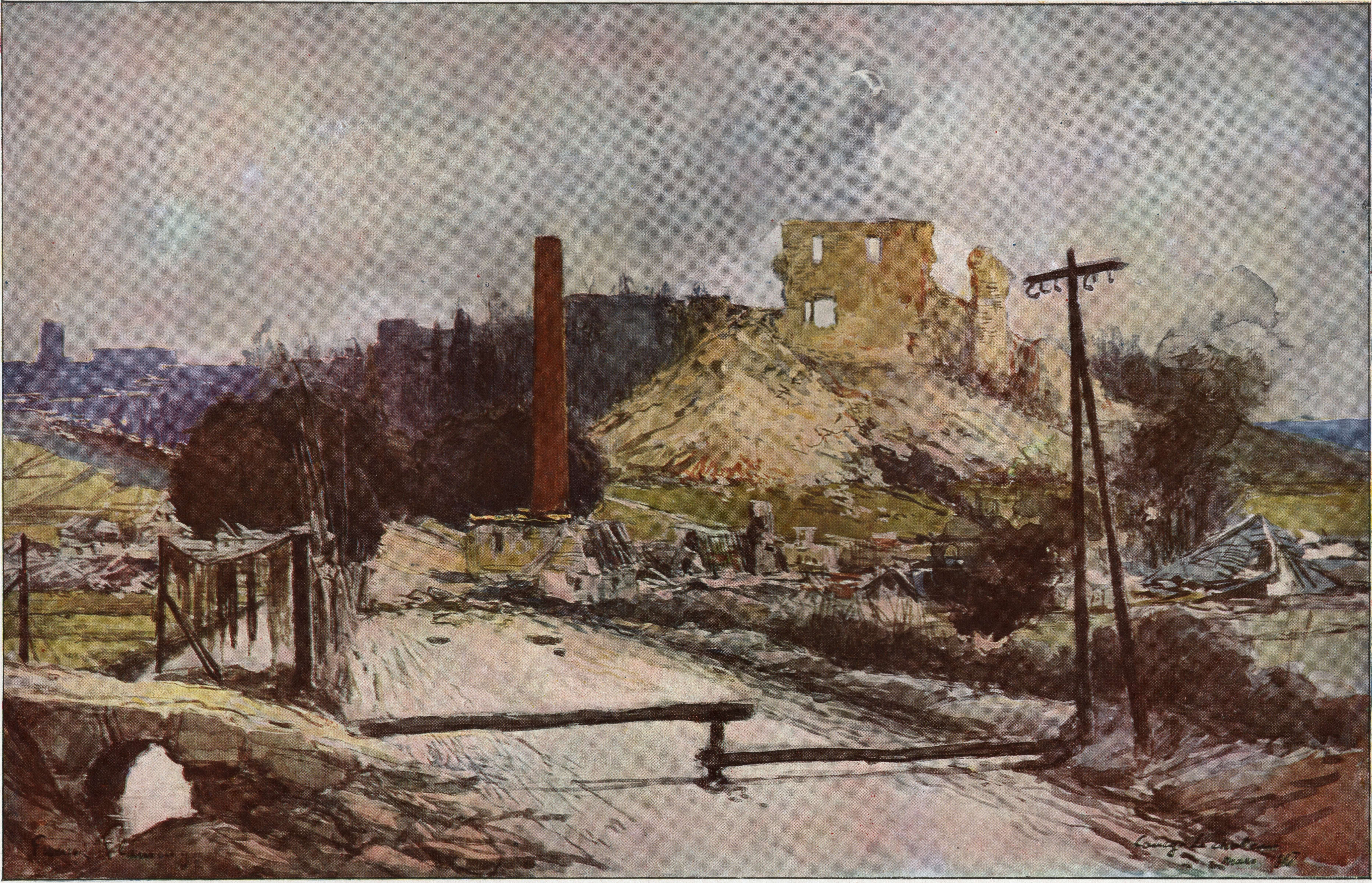 Scan of L'ILLUSTRATION No 3905 5 Janvier 1918. Coucy-le-Château aprés la destruction allemande.